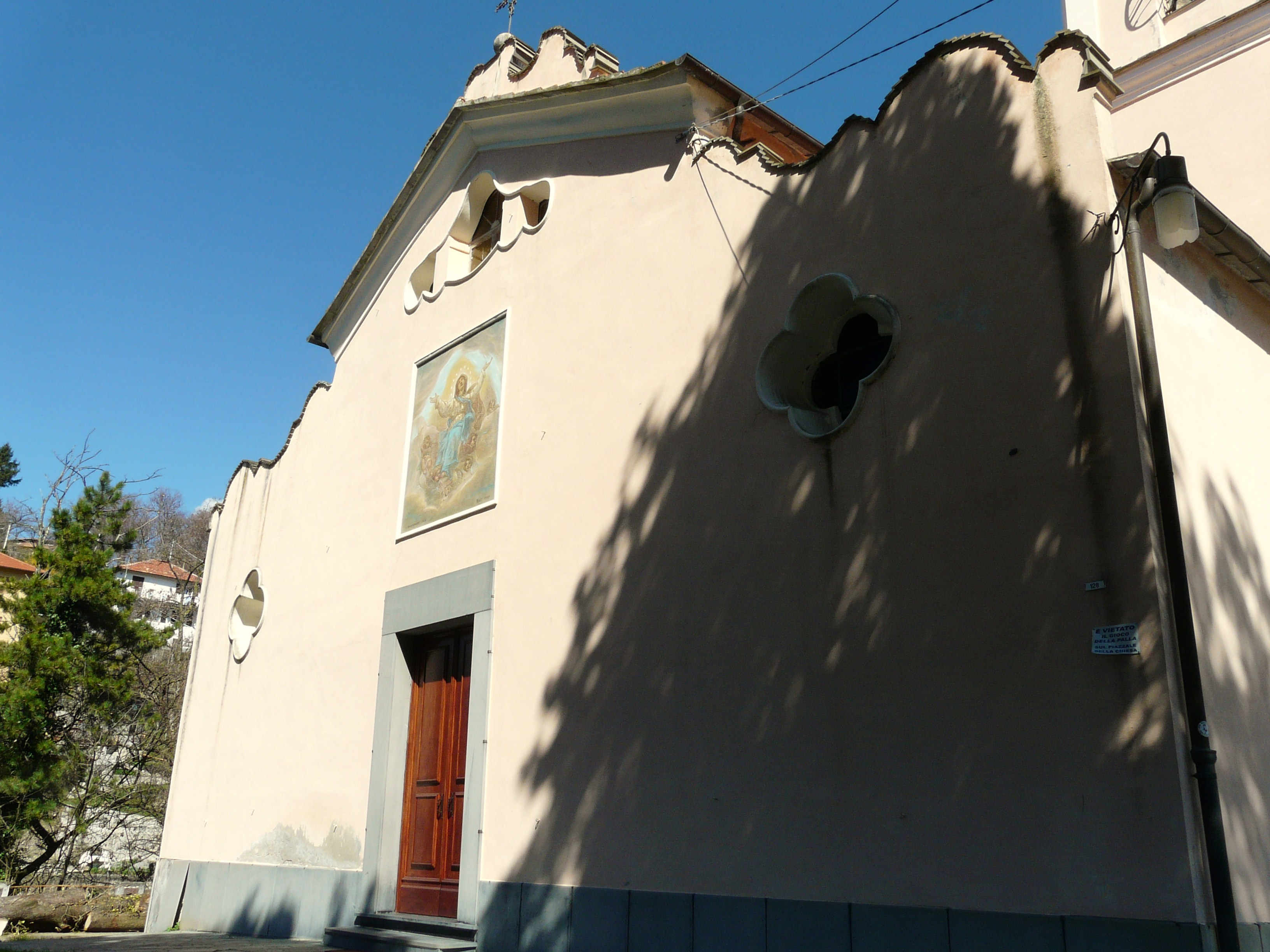 Pieve di Santa Maria Assunta di Bargagli, Liguria, Italia